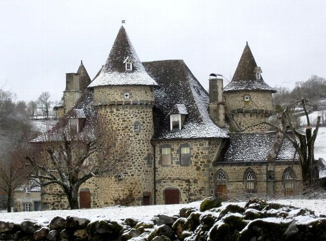 Chateau de Sourniac dit de Sartiges